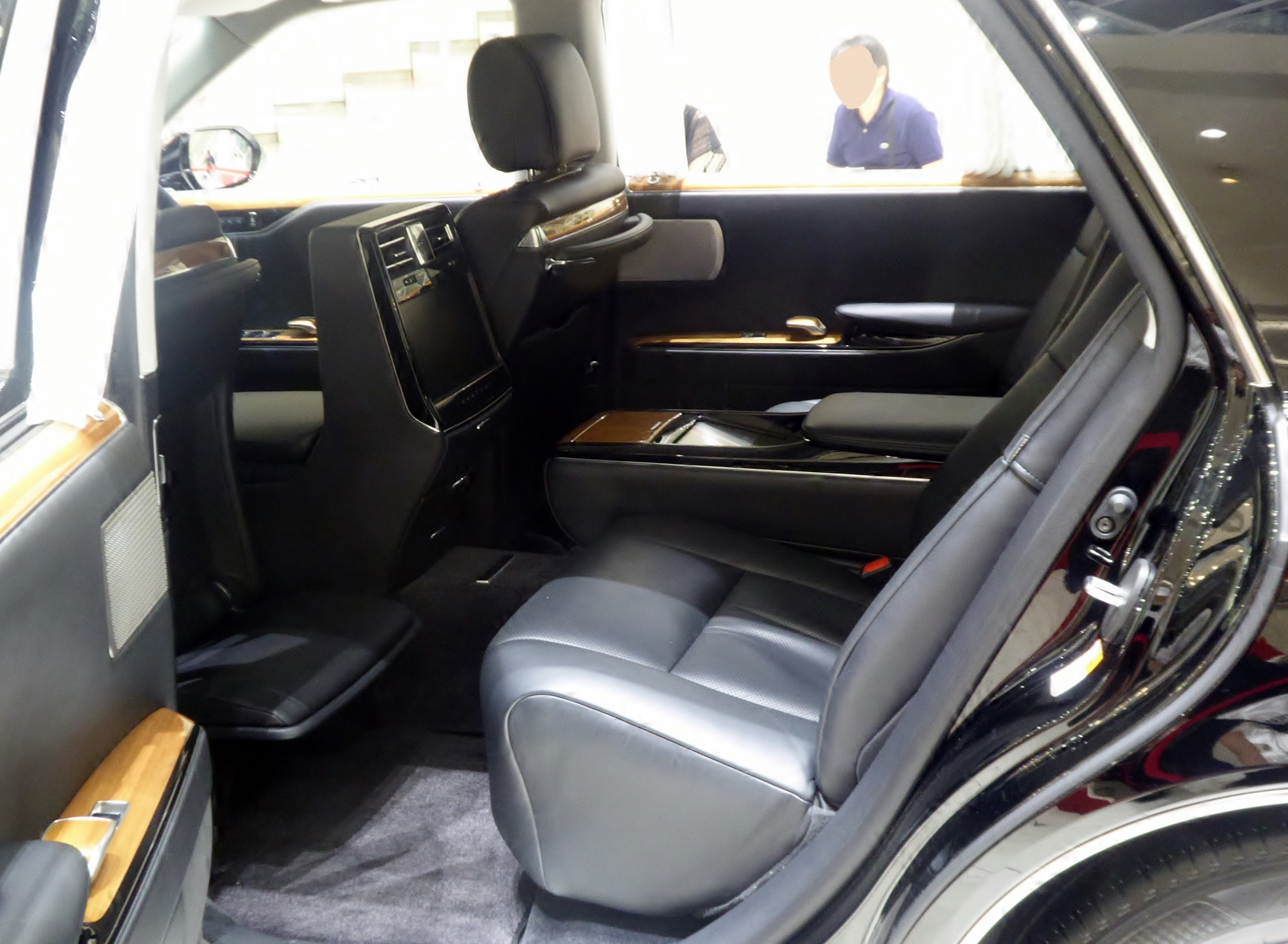 DAA-UWG60-AEXGH型トヨタ・センチュリーのインテリアを撮影。